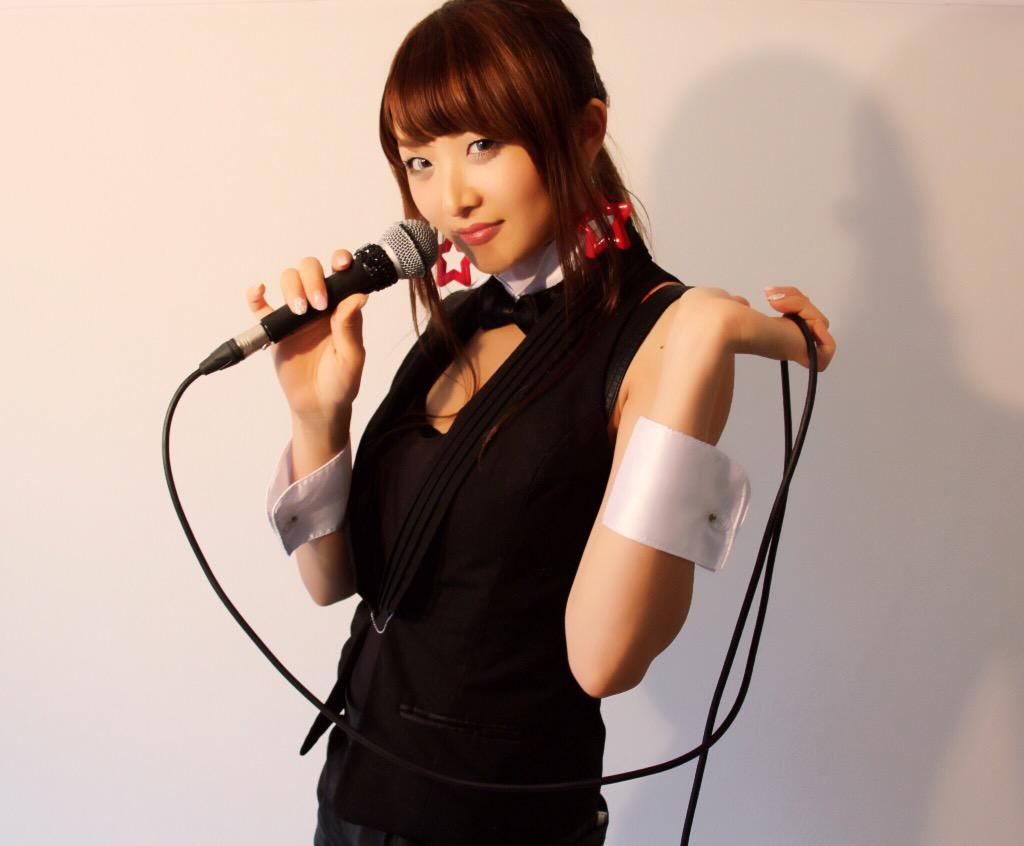 都乃のアーティスト写真